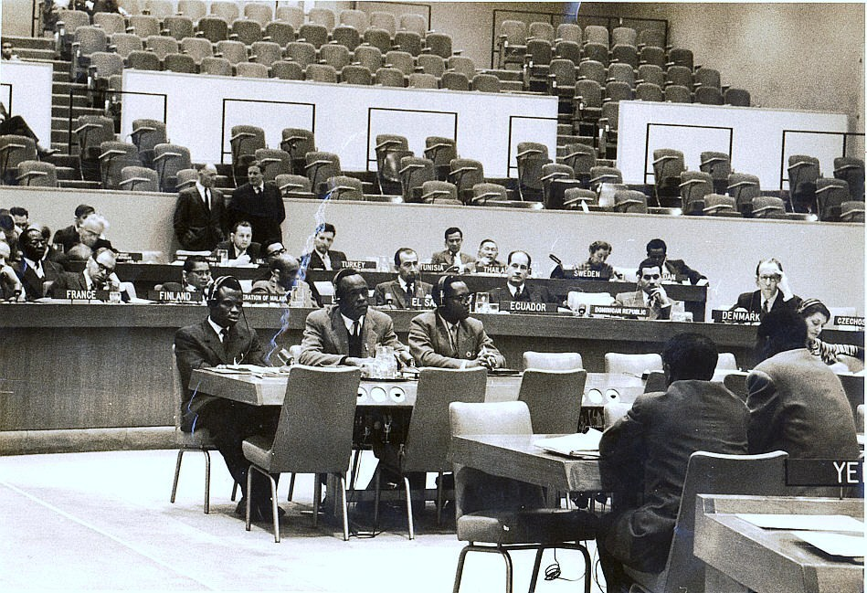 Manga Bilé Blaise du Pdc, assis au centre, au palais des Nations Unies à New-York en 1958. A sa droite on reconnaît Ndeh Ntumazah de l'Upc et un délégué du Burundi à sa gauche. En face étaient assis des membres de la délégation de l'Upc, notamment Ernest Ouandié. A la tribune on peut reconnaître Léopold Sédar Senghor du Sénégal.